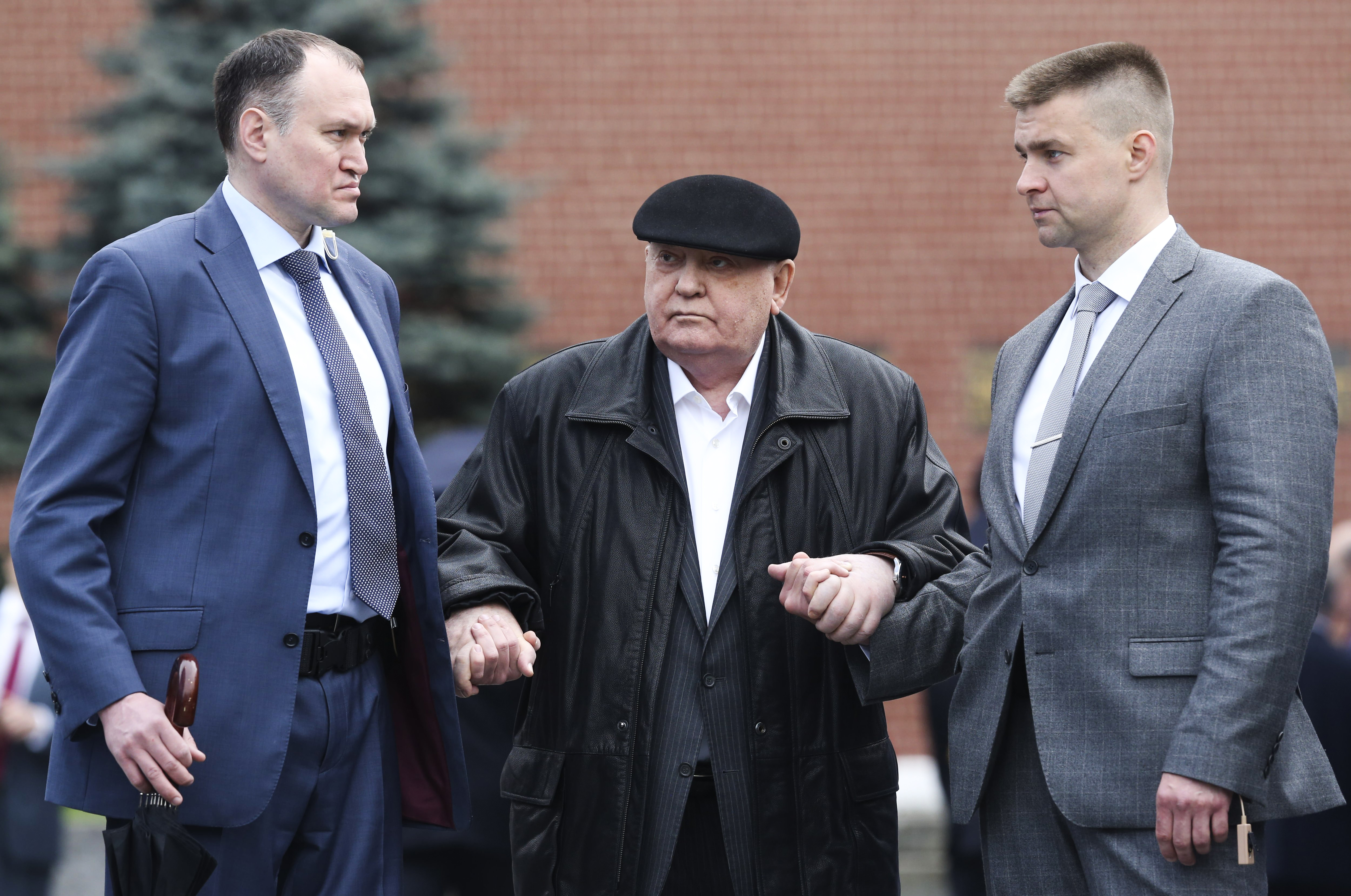 Михаил Сергеевич Горбачев (в центре) на параде в честь 74-й годовщины Победы в Великой Отечественной войне в Москве.